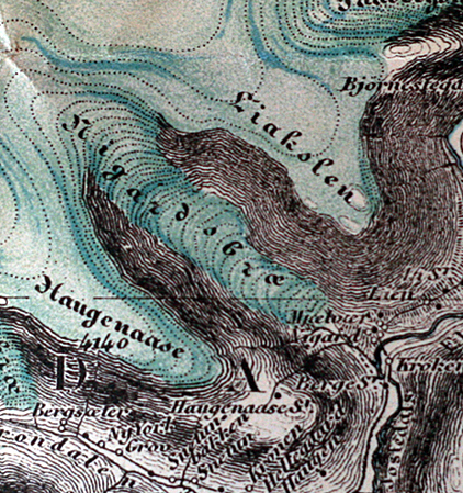 Nigardsbreen på kart fra 1901.